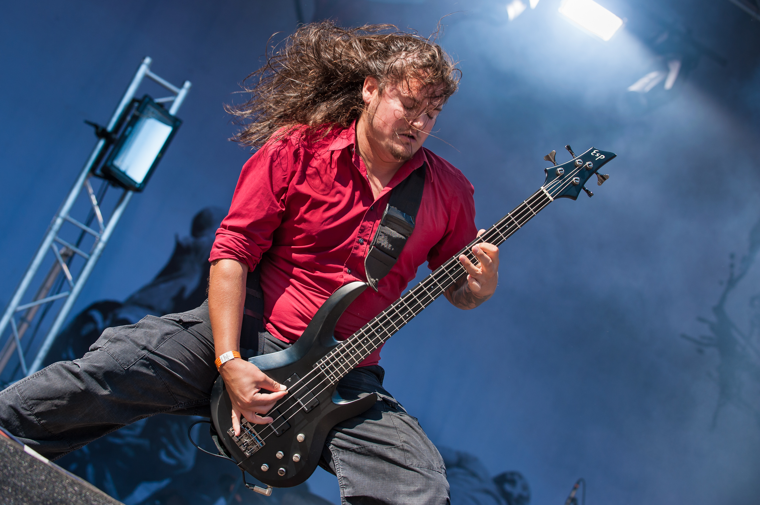 Heaven Shall Burn (deutsche Metalcore-Band) beim Rockfestival Rocco del Schlacko August, 2012. Am Bass, Eric Bischoff.